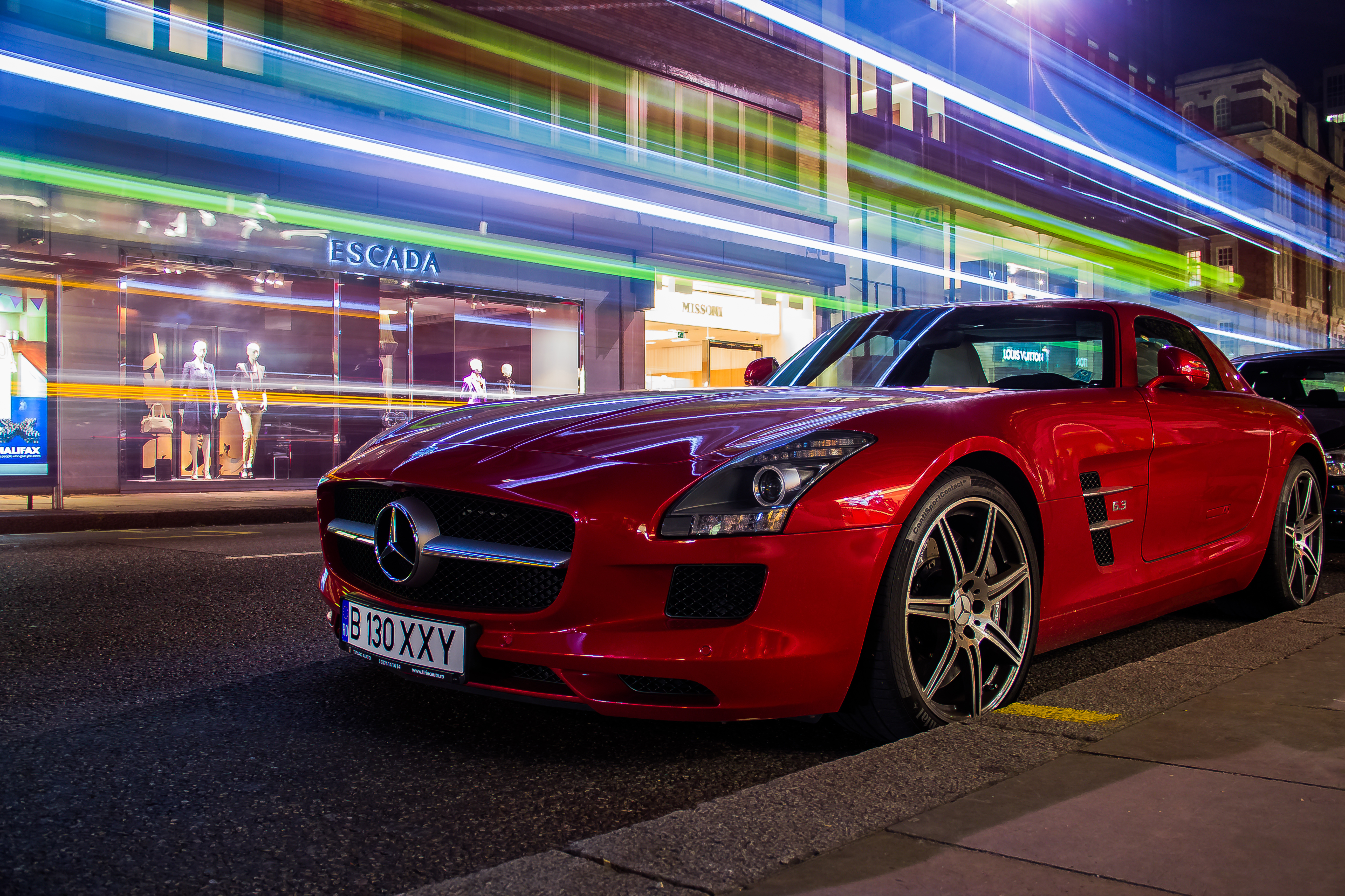 Red sls